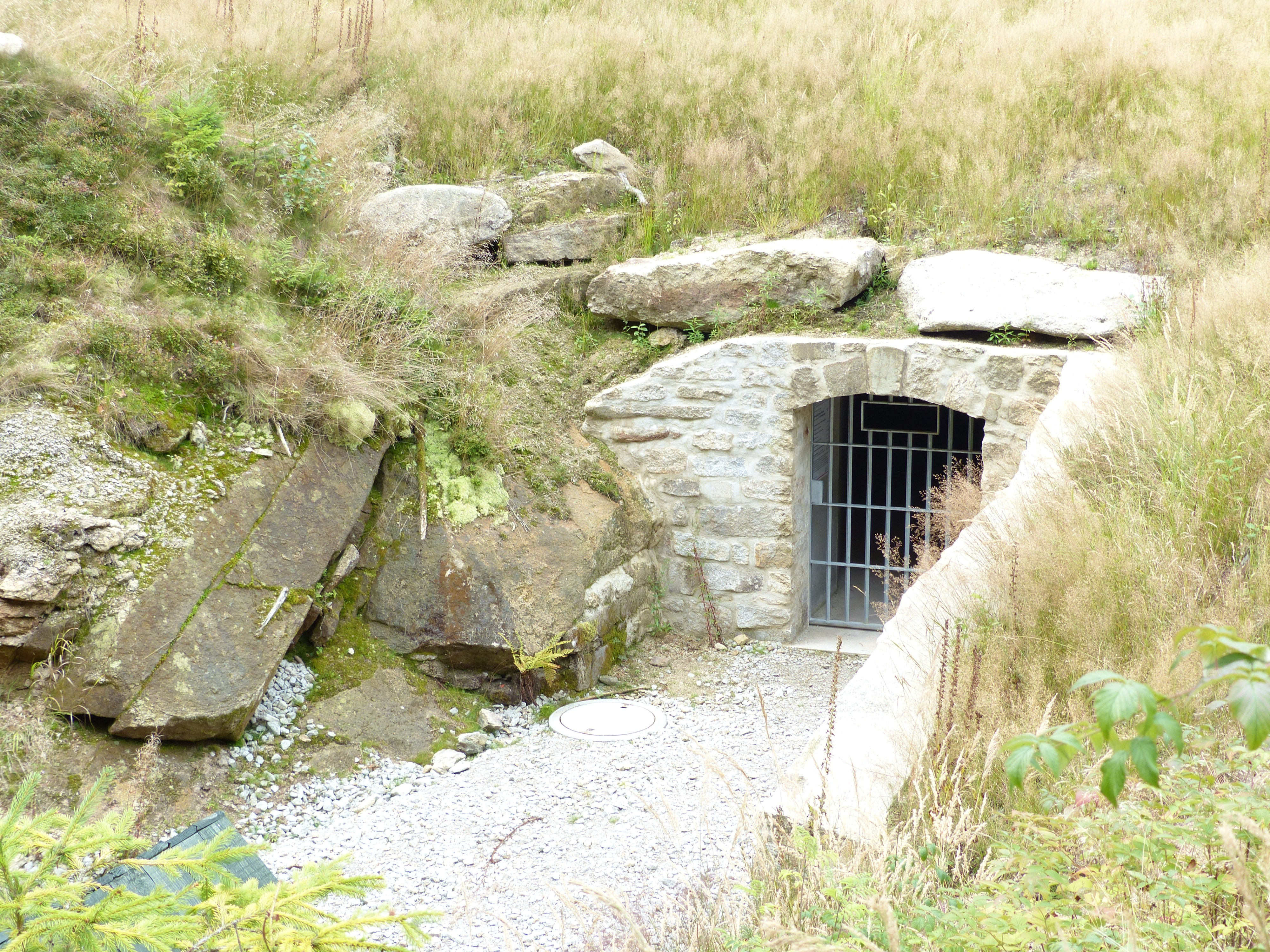 Außengelände Uranbergwerk Weißenstadt